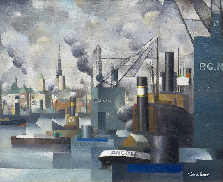 CUBISME